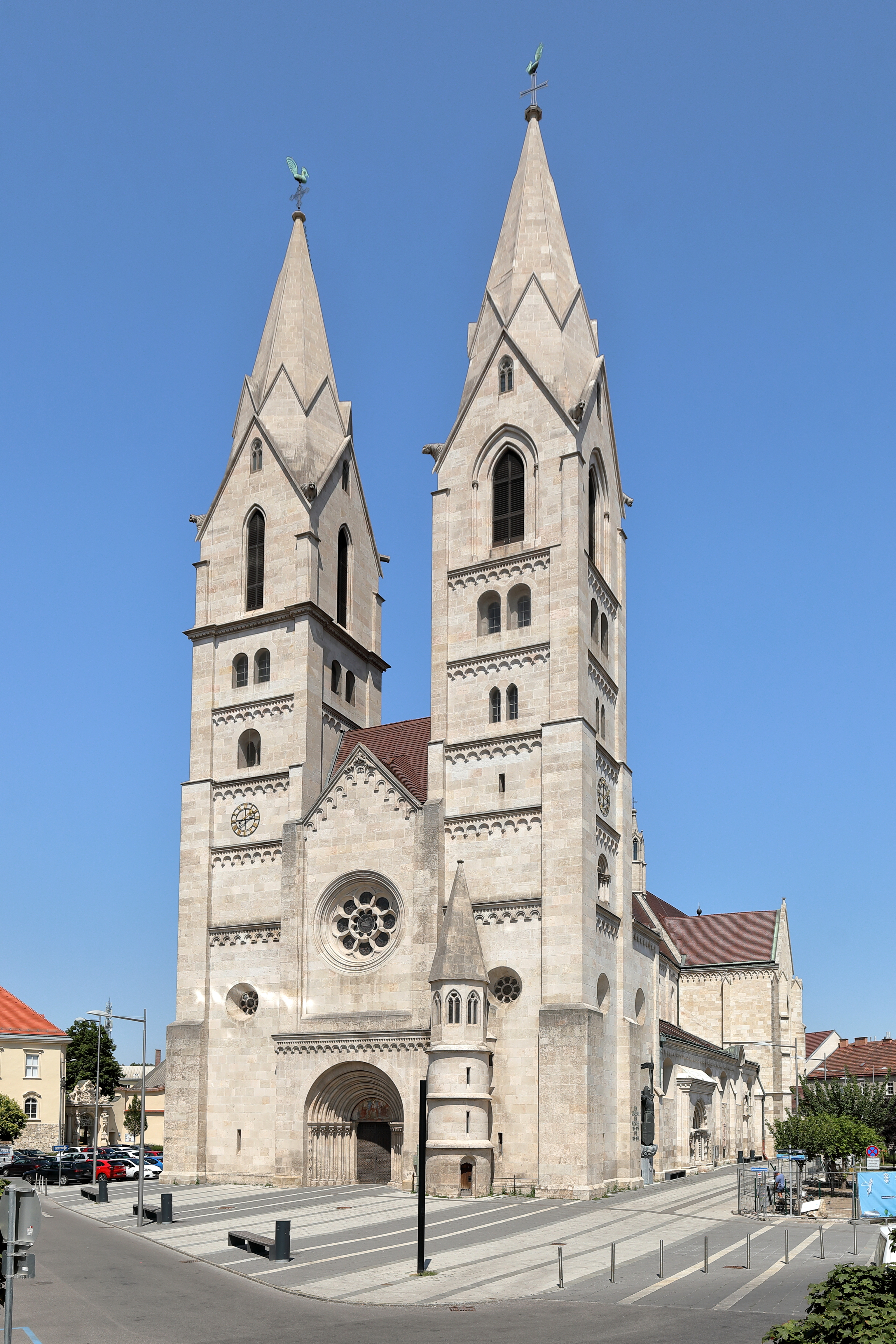 Südwestansicht des Domes Mariä Himmelfahrt in der niederösterreichischen Bezirkshauptstadt Wiener Neustadt.Das Langhaus mit dem Westturmpaar wurde von 1193 bis 1279 im spätromanischen-frühgotischen Stil errichtet. Im ersten Viertel des 14. Jahrhunderts wurde das Querschiff und der polygonale Chor mit den Seitenchören sowie eine zweigeschossige Sakristei im Norden errichtet. Unter Kaiser Friedrich III. erfolgten im 15. Jahrhundert Umbauten und eine Neuausstattung. Unter Bischof Ferdinand Graf von Hallweil wurde 1755 der Dom barockisiert. Nach einem Brand 1834 in der Glockenstube wurden die baufälligen Türme 1886 abgetragen und nach den alten Plänen unter der Leitung des Wiener Architekten Richard Jordan von 1892 bis 1899 wieder aufgebaut.